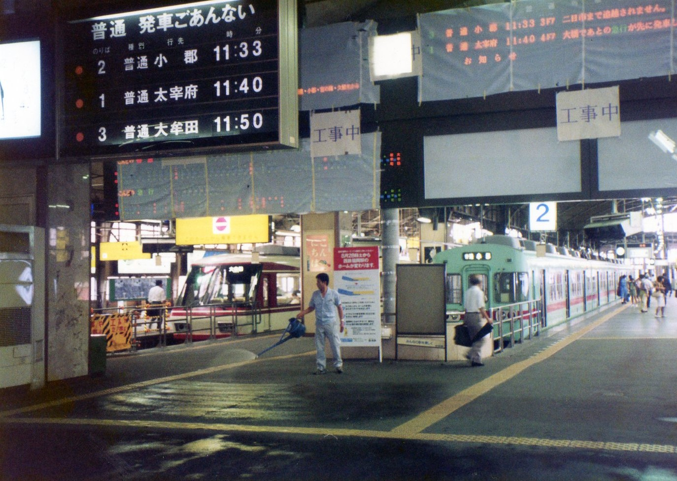 1995年の西鉄福岡駅構内